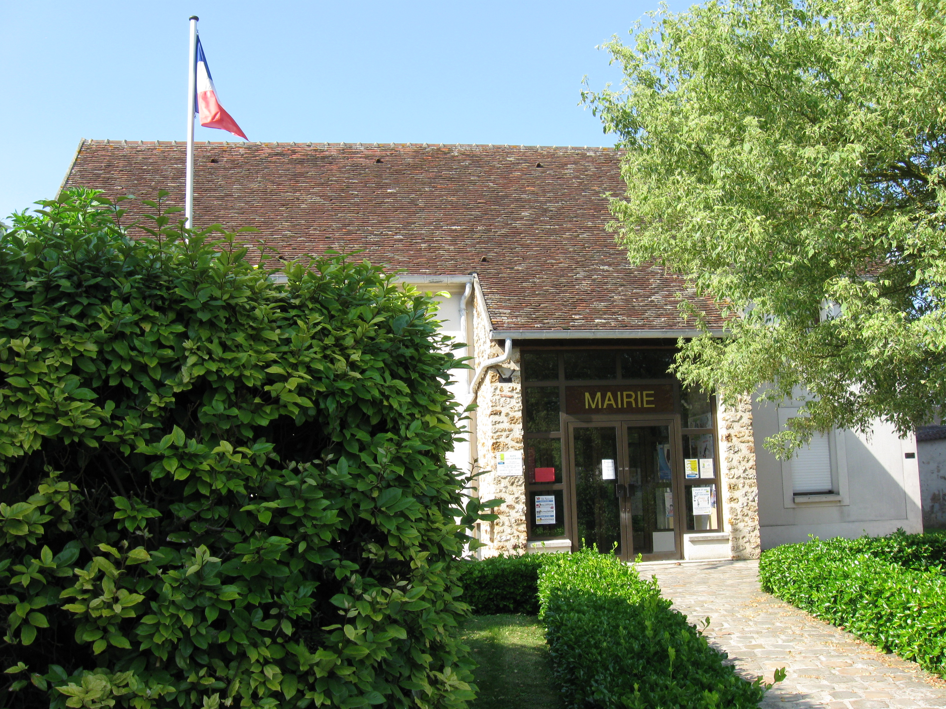 Mairie d'Ussy-sur-Marne (département de la Seine-et-Marne, région Île-de-France).